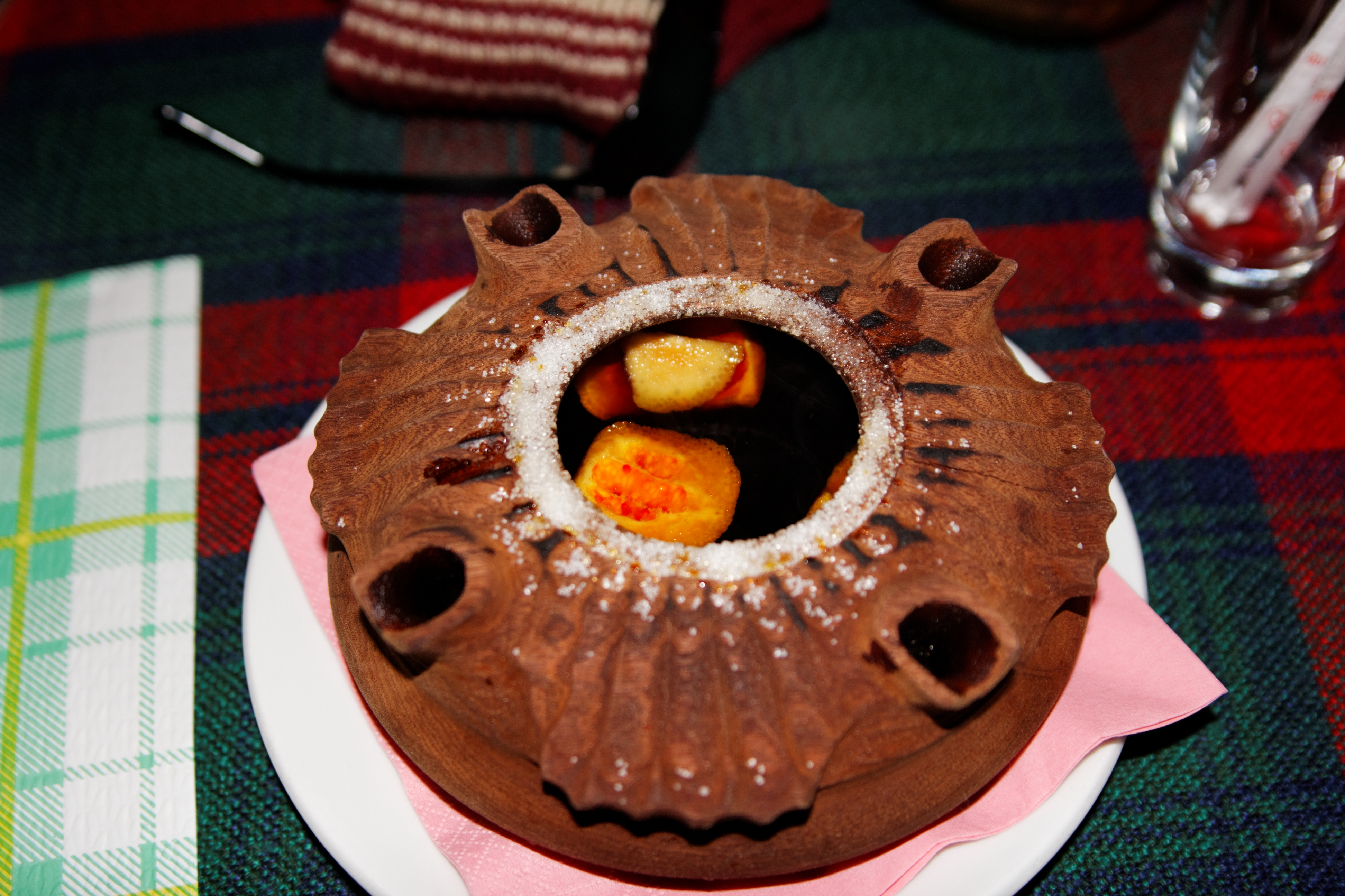 Coppa dell'amicizia in uso. Foto scattata a Cogne nel 2009.